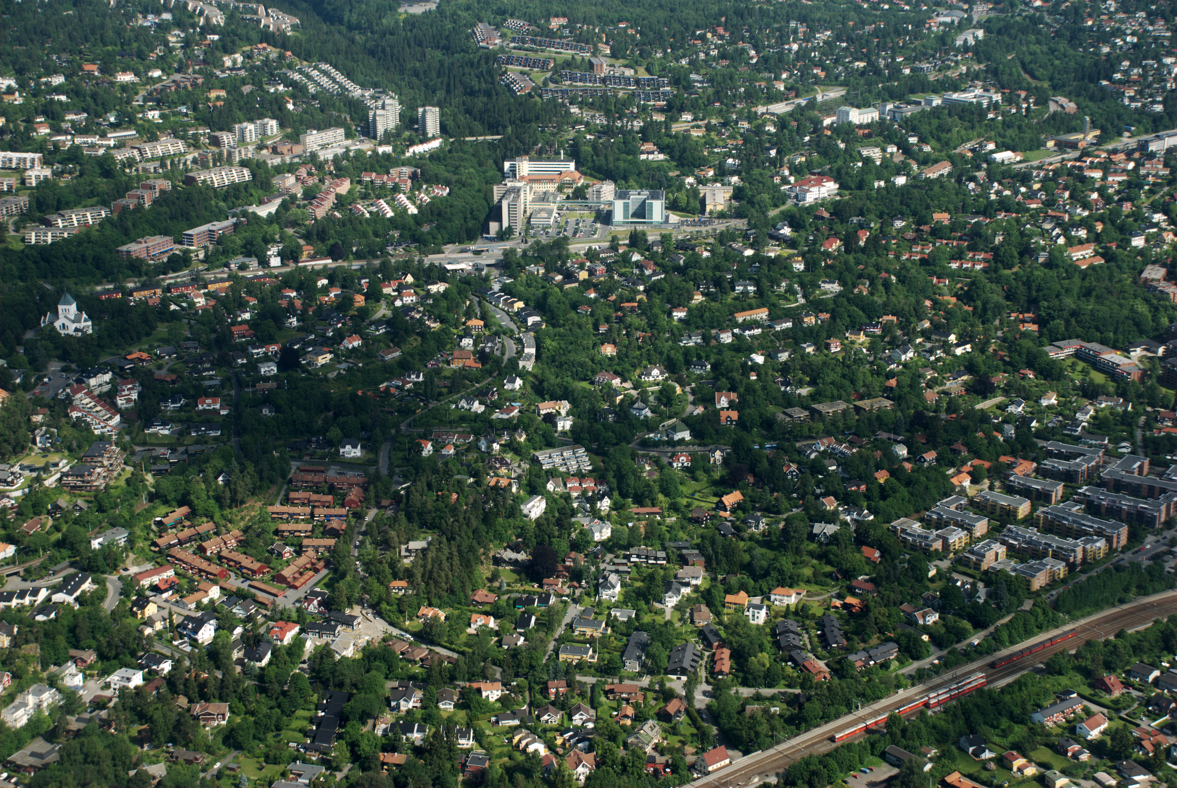 Oversiktsbilde over mange av strøkene i øst-delen av Bydel Ullern. Fra øverst til venstre: Ullernåsen, Montebello (med Husebyskogen), Ullern, Bestum og Abbediengen